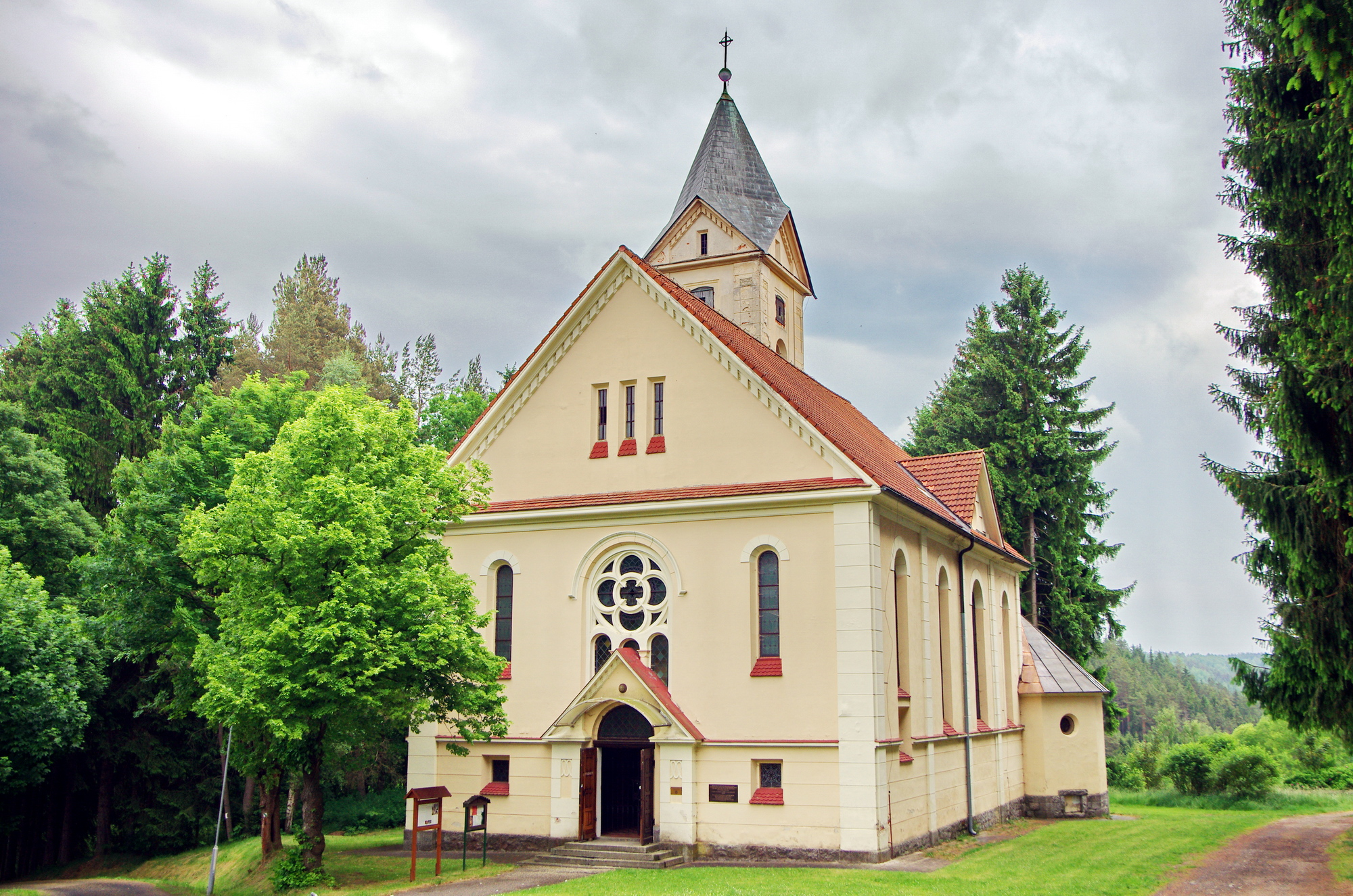 Rotava, kostel sv. Petra a Pavla, Krušné hory, okres Sokolov